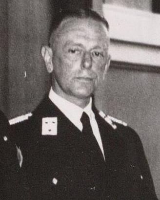 hoofdcommissaris Tulp bij zijn installatie